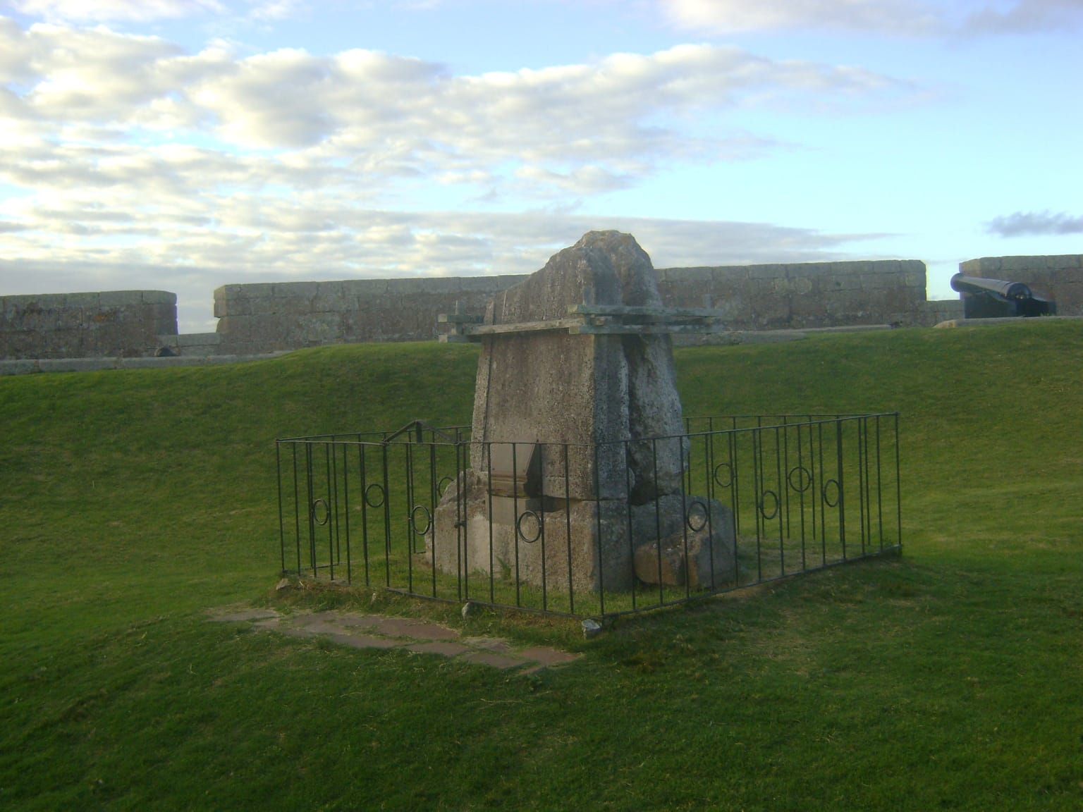 Fortaleza de Santa teresa. Rocha, Uruguay